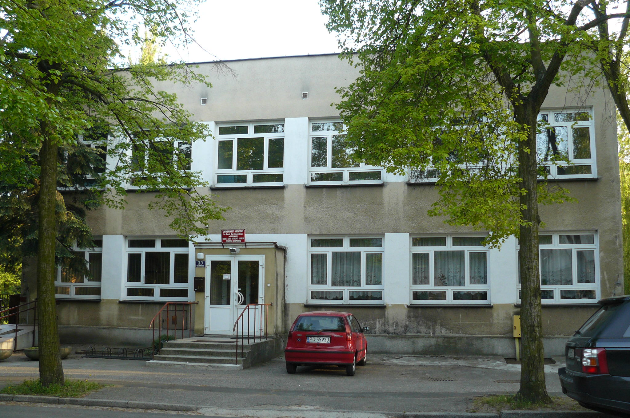 Uniwersytet Medyczny Poznań, ul. Mazowiecka 33, Katedra Farmakognozji (built. 1980)